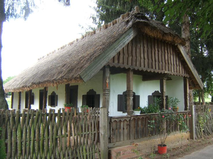 Népi lakóház a kisbajomi falumúzeumban (Somogy megye)